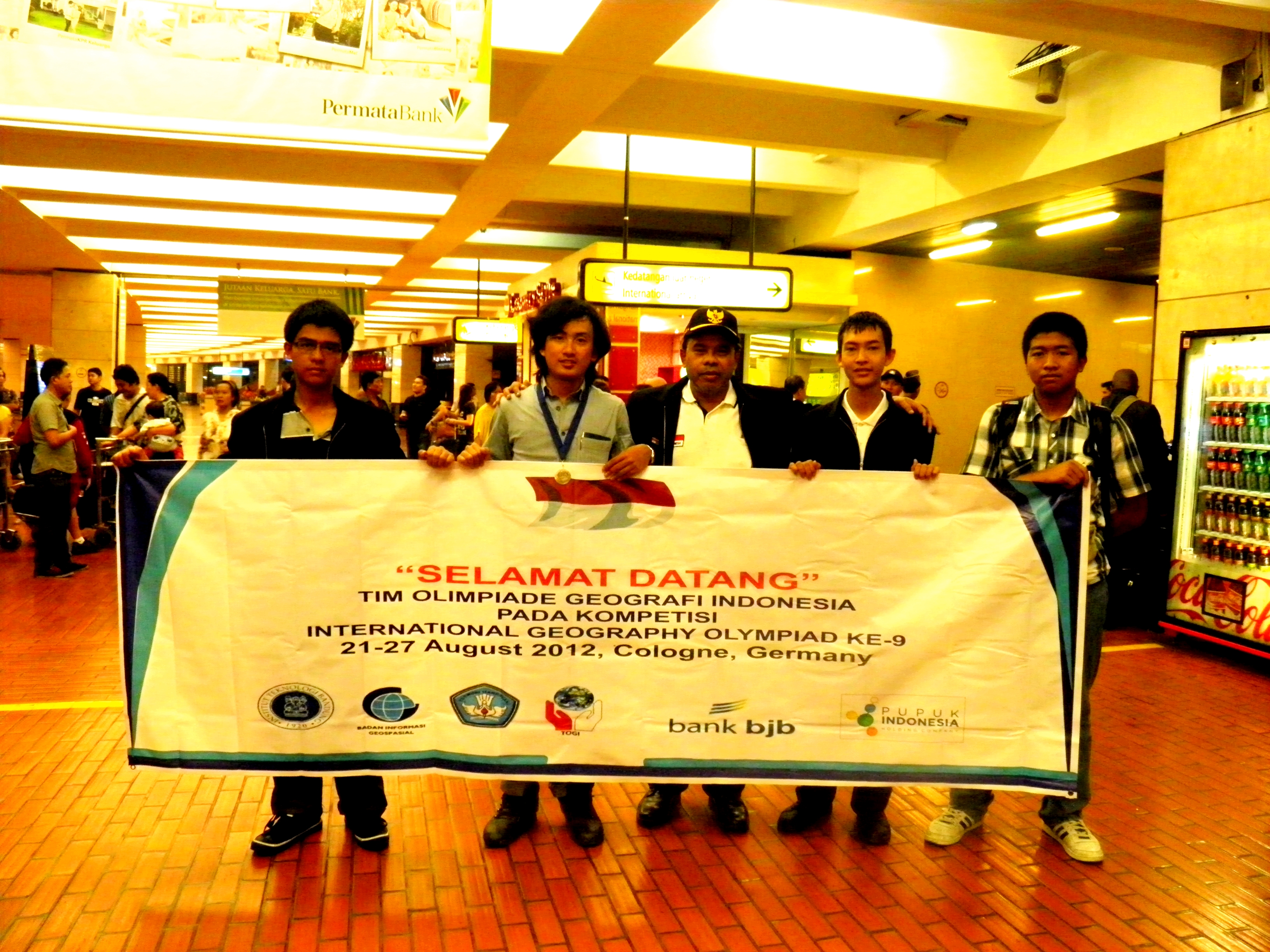 Bintang Rahmat Wananda - pulang IGEO 2012